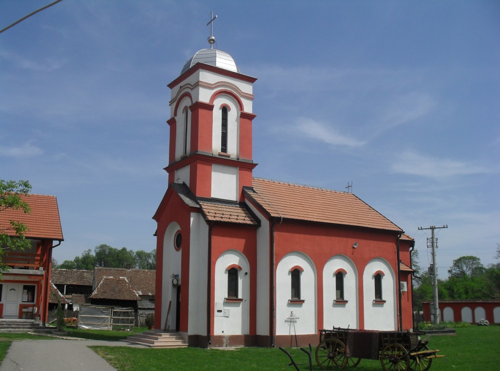 Манастир Илиње, Очаге, Мачва, Србија. Храм СПЦ Св.пророка Илије.